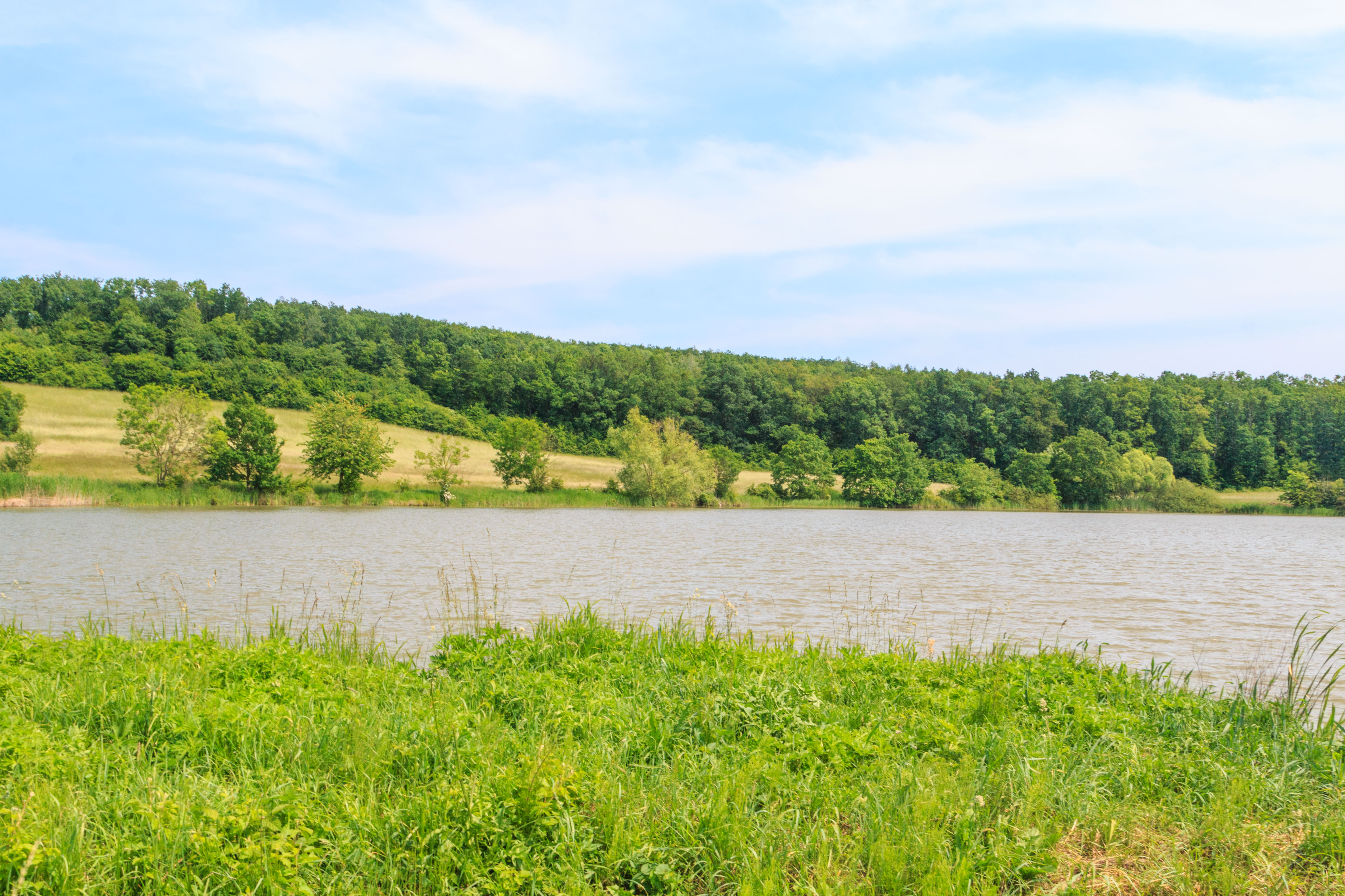 Zámecký rybník u Jičíněvsi Project: Vodstvo.